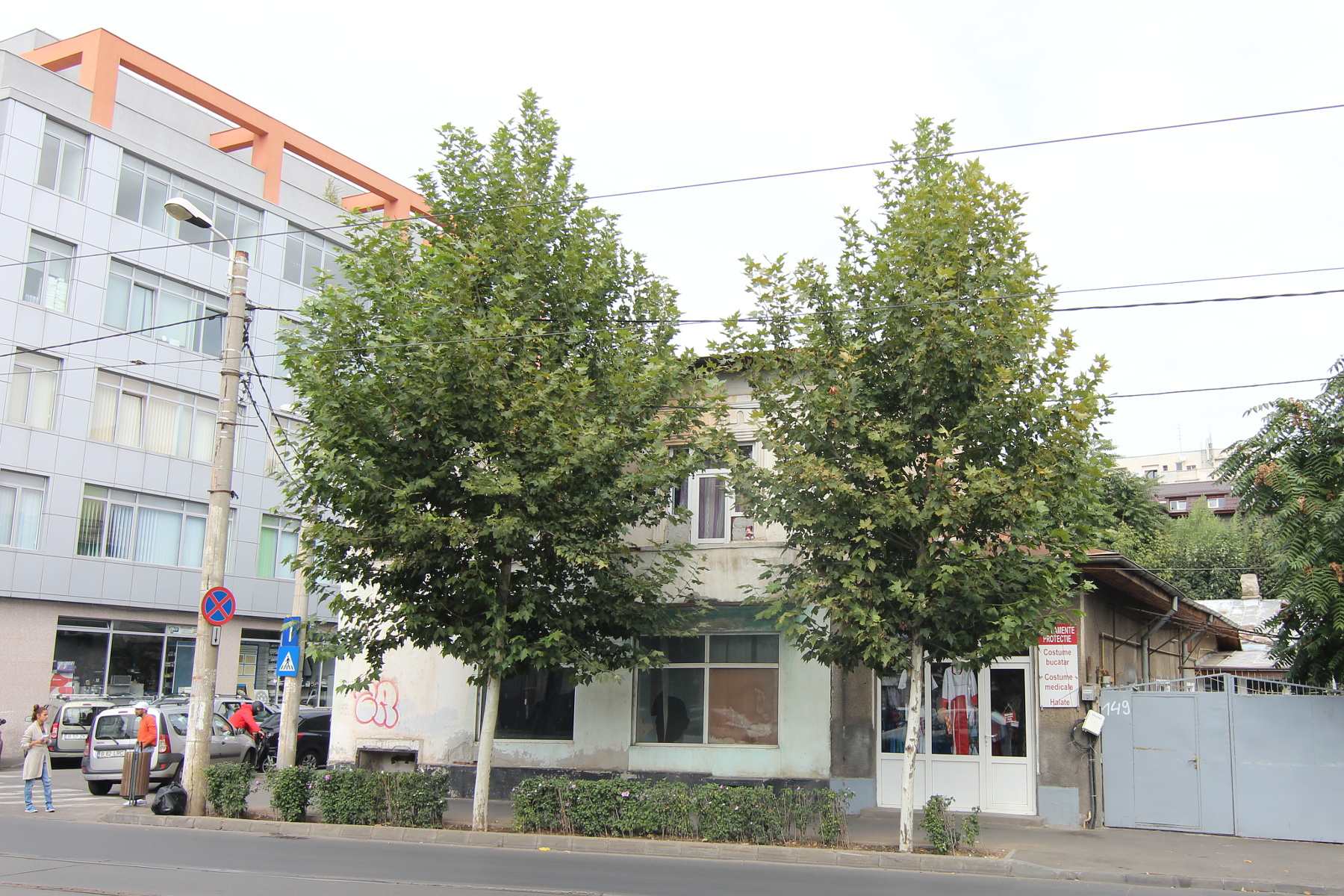 Casă pe Dudești